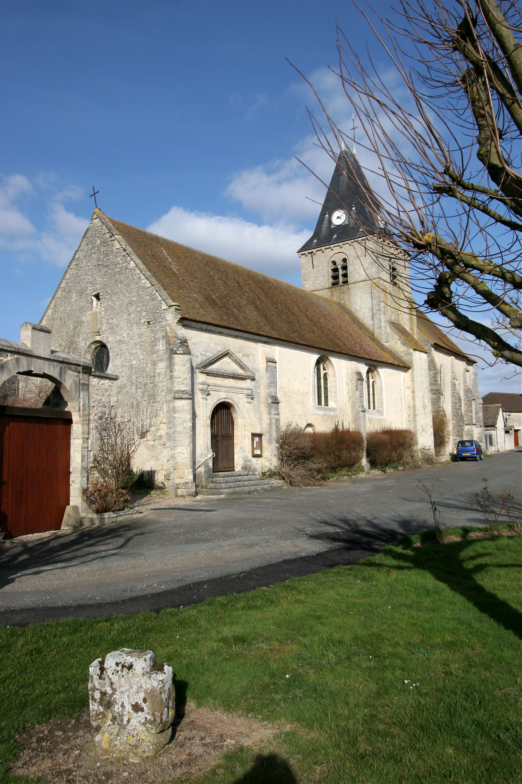 Omerville, Val d'Oise, la croix pattée avec en arrière-plan, l'église Saint Martin.